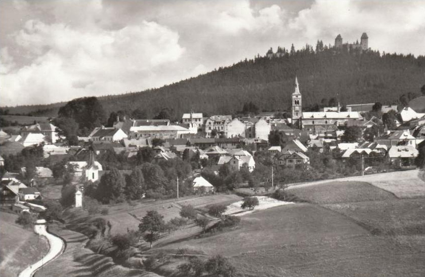 Kasperske Hory 1938, dobová pohlednice